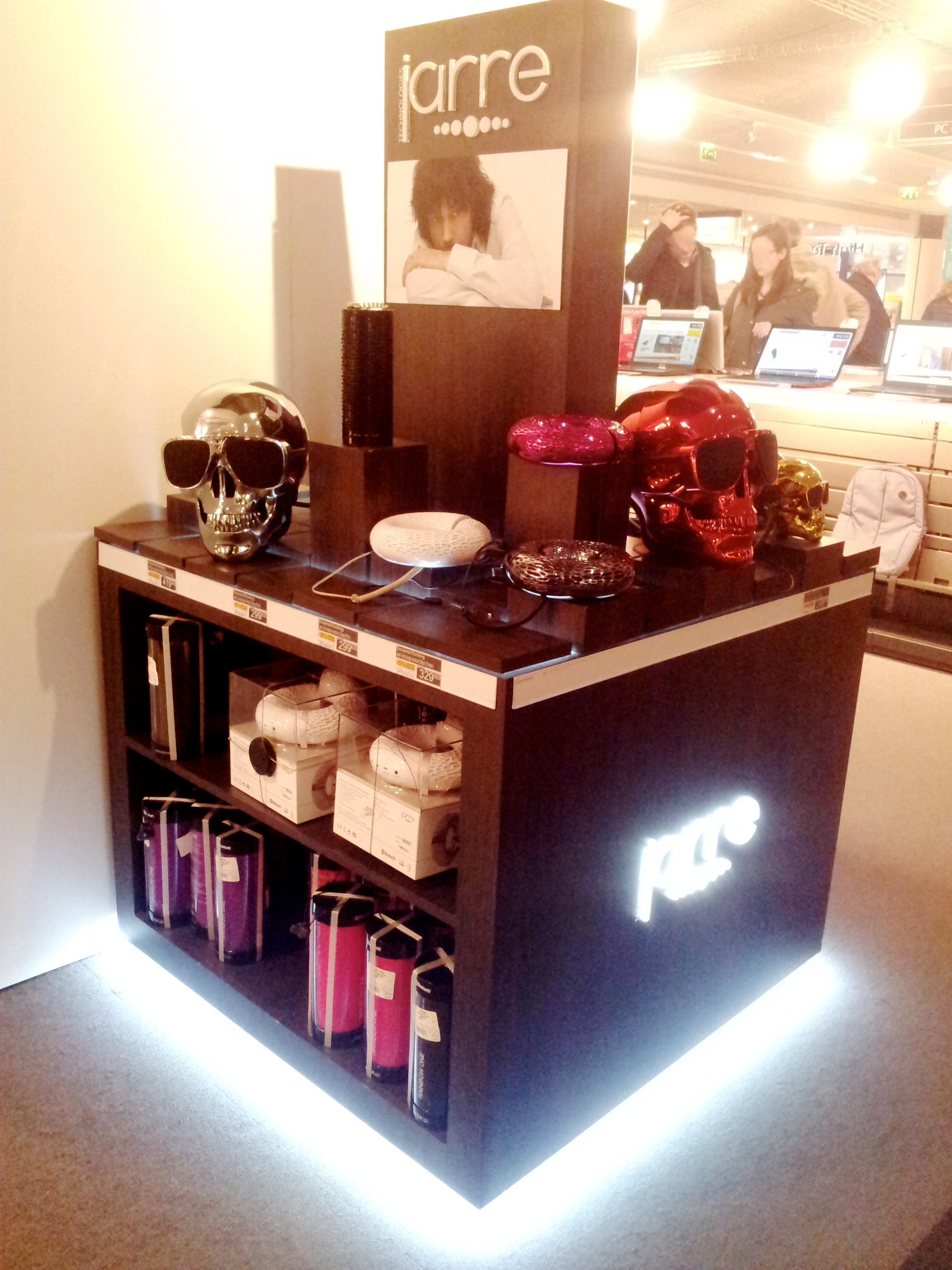 Stand Jarre Technologies, produits dérivés pour les fans de Jean Michel Jarre. (Exposition à la Fnac de Lille)